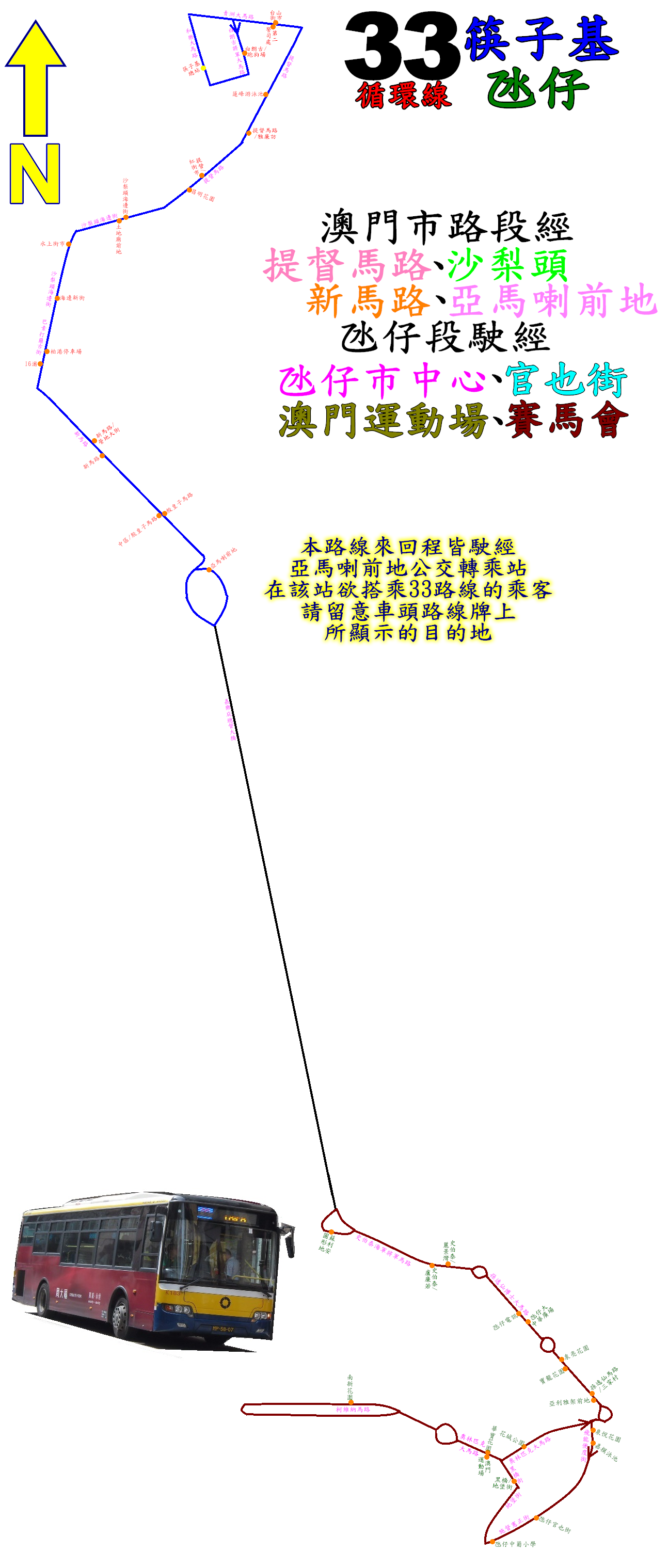 中文（香港）: 澳門巴士33號線的走線圖